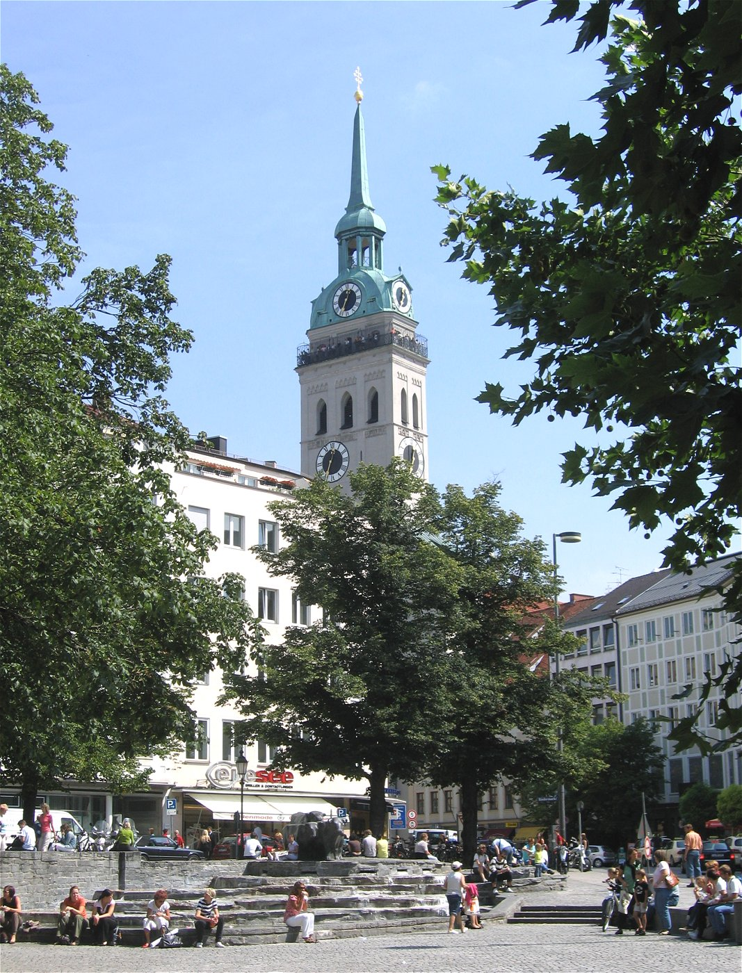 Rindermarkt, München, im Hintergrund die Kirche Sankt Peter